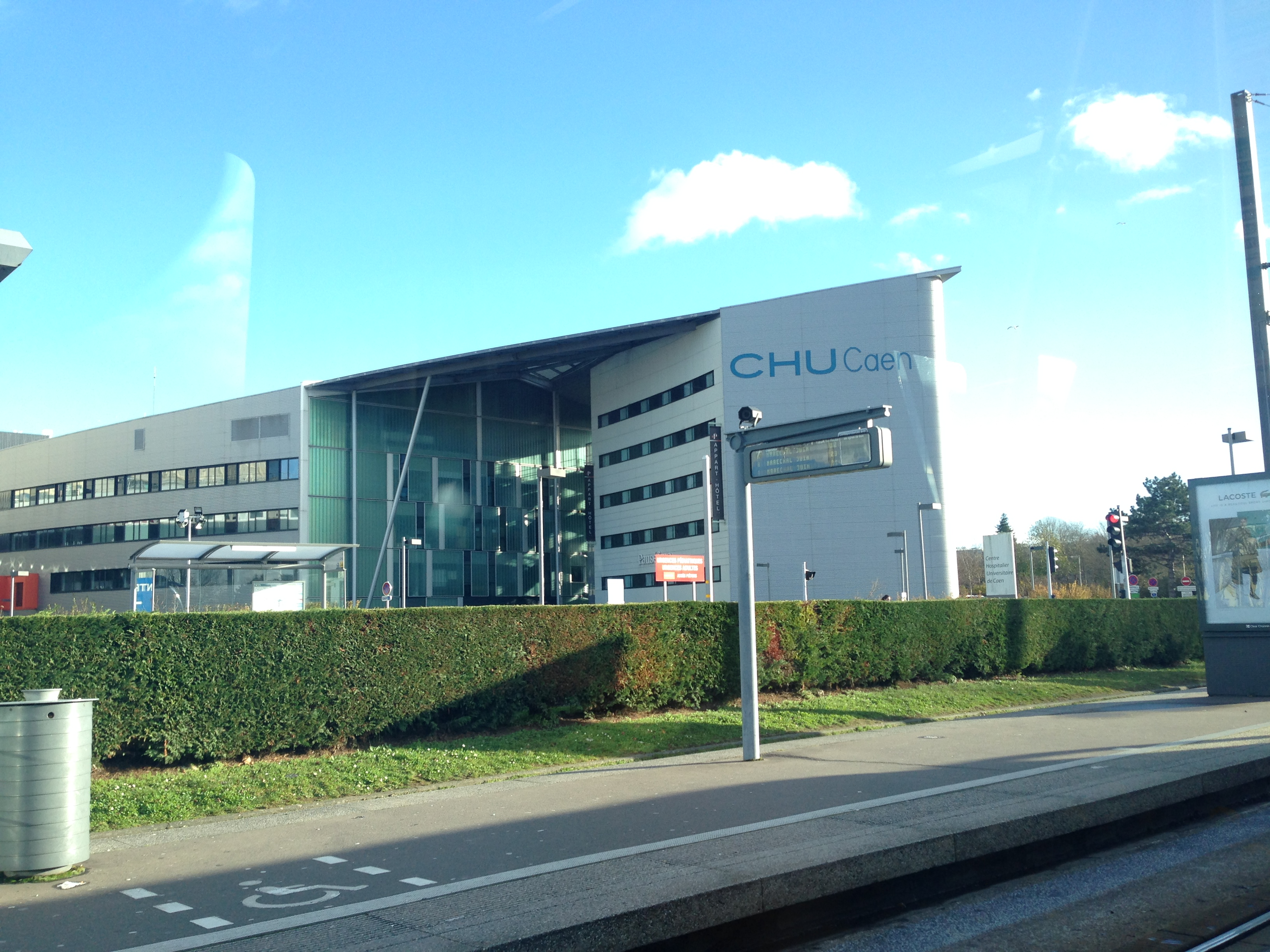 CHU Caen